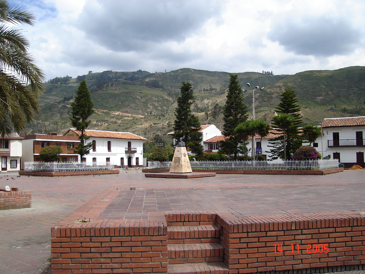 Parque principal del municipio de Corrales, e Boyacá, Colombia